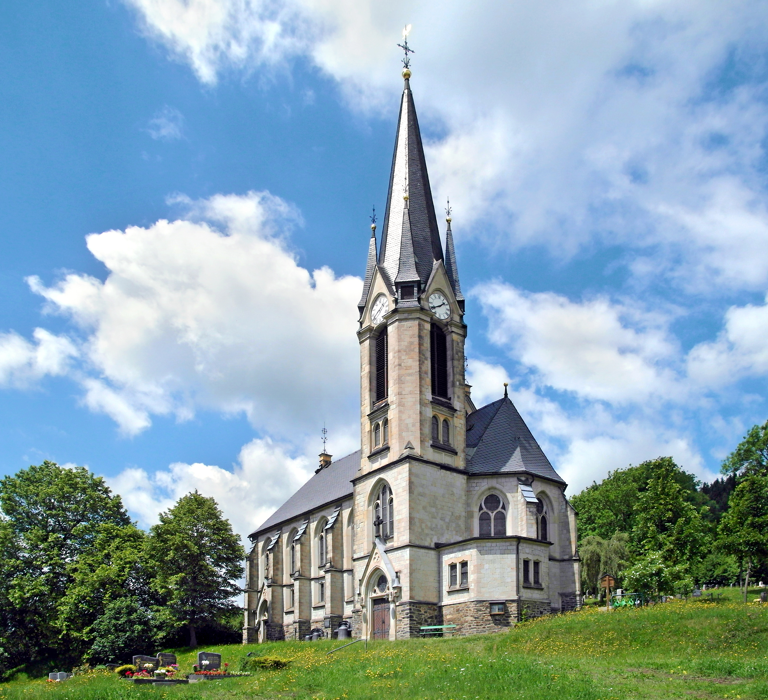 17.06.2017 09623 Rechenberg (Rechenberg-Bienenmühle): Kirche Rechenberg. An der Schanze 4 (GMP: 50.737365,13.555675). Von 1899 bis 1901 entstand die neue Pfarrkirche im neogotischen Baustil nach Plänen von Kirchenbaumeister Theodor Quentin aus Pirna. Bauausführung durch die Baufirma Schäfer aus Copitz bei Pirna. 2010 bis 2012 wurde das Kirchenschiff restauriert. [SAM0463.JPG]20170617250DR.JPG(c)Blobelt